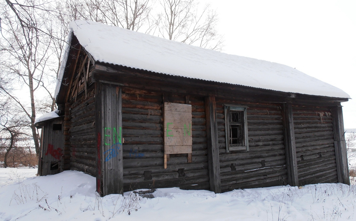 Дом, где жил Пастухов И.Д. -руководитель ижевской организации РСДРП: переулок Безымянный, 25, Ижевск, Удмуртия